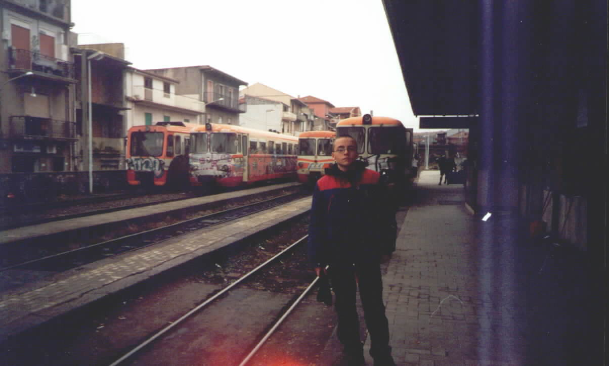 Foto di una stazione